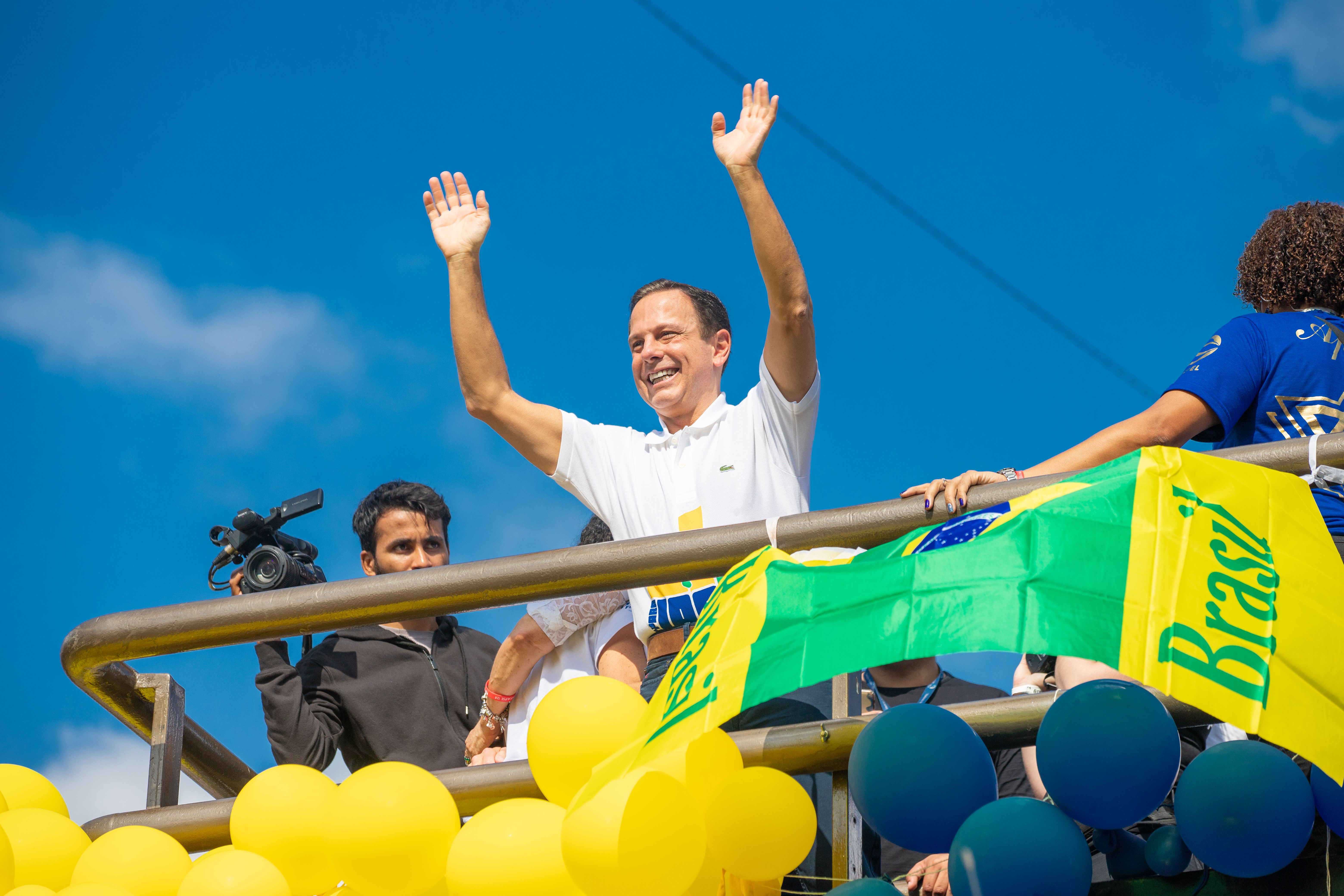 O governador do Estado de São Paulo, João Doria, participa da Marcha para Jesus em São Paulo. Data:20/06/2019. Local: São Paulo. Foto: Governo do Estado de São Paulo